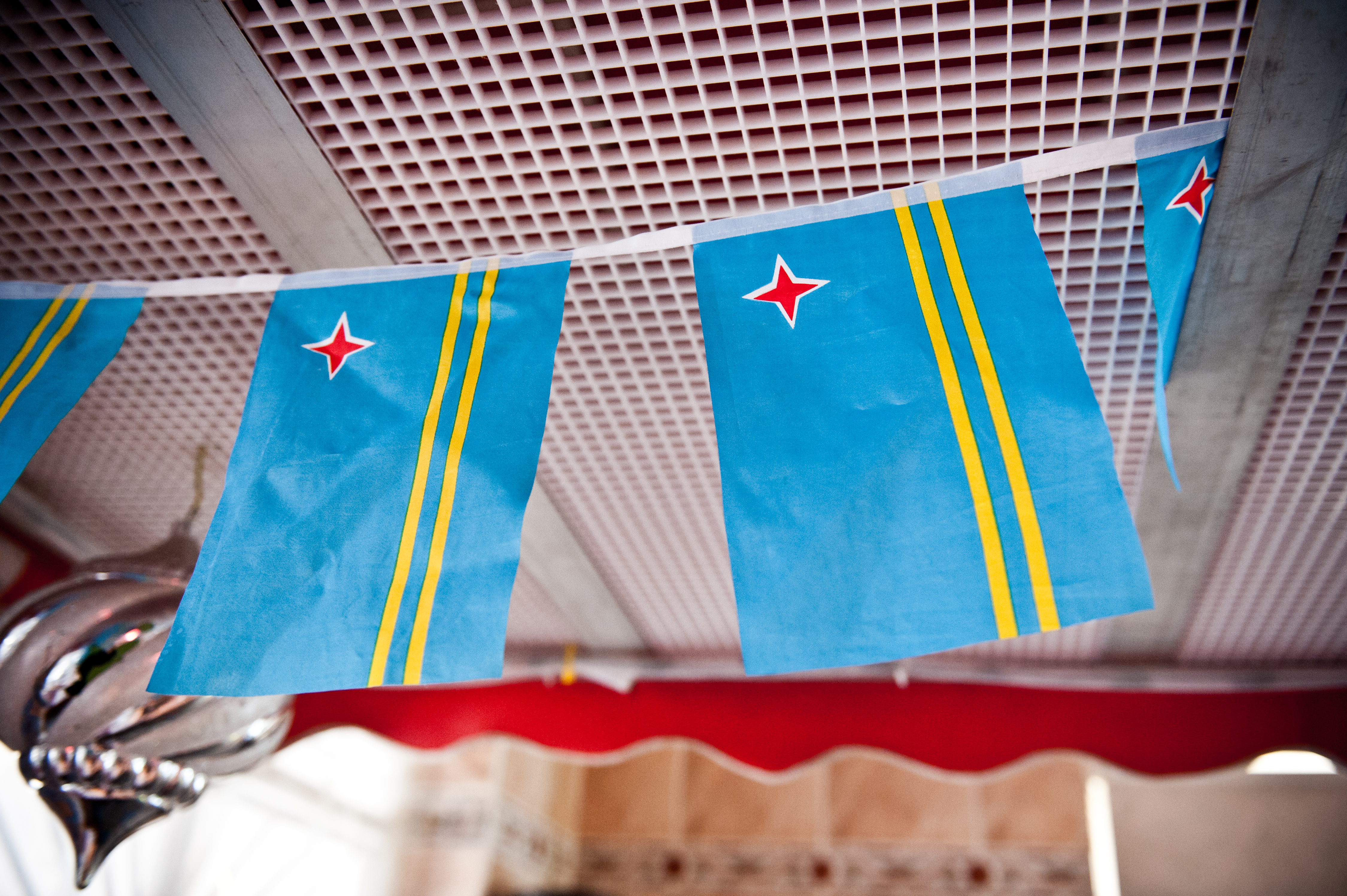 JOH_4937